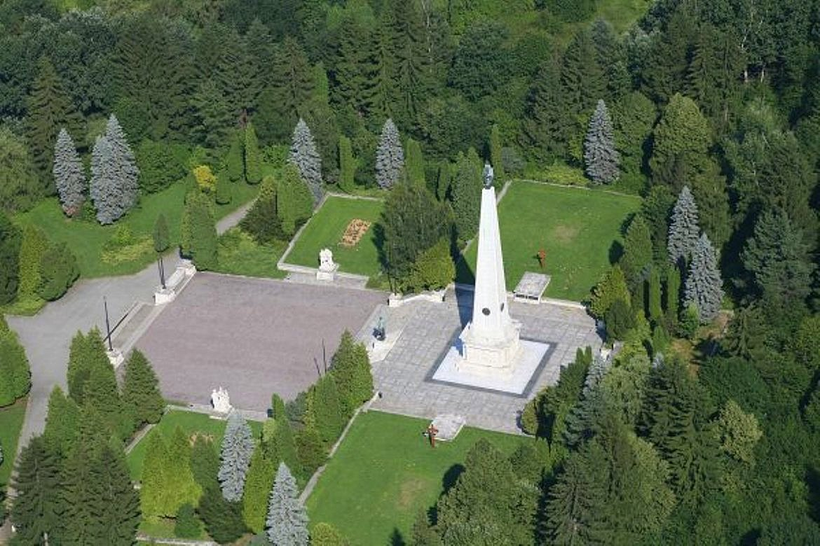 Pamätník sovietskej armády.Svidník.